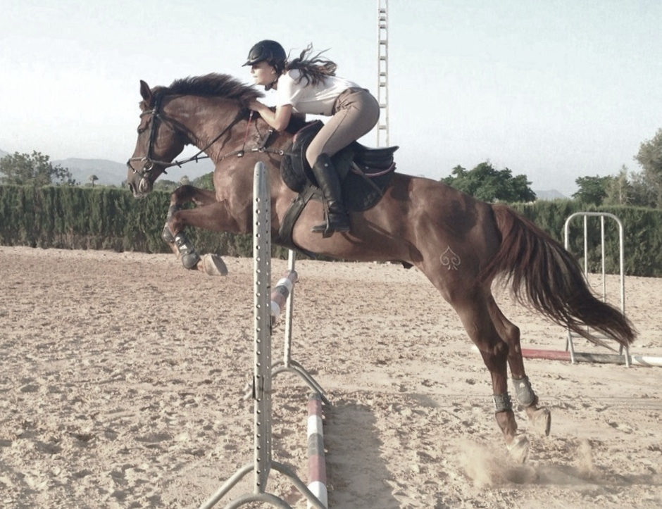 Posición de inicio de salto correcta